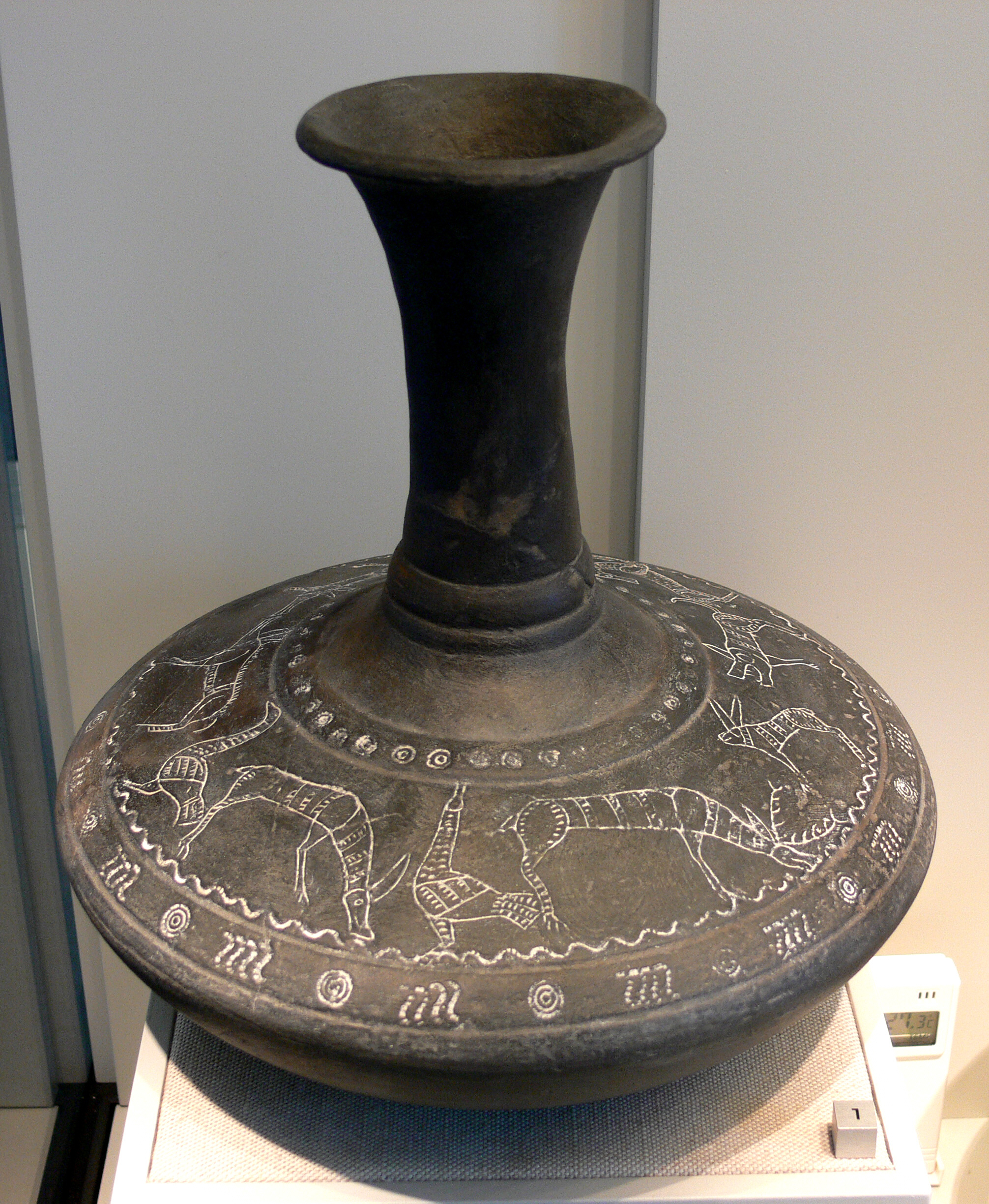 Linsenflasche mit Tierfries, Keramik, 5. Jh. v. Chr., Matzhausen (Dietldorf, Burglengenfeld), Bayern. Museum für Vor- und Frühgeschichte Berlin, in Neues Museum.